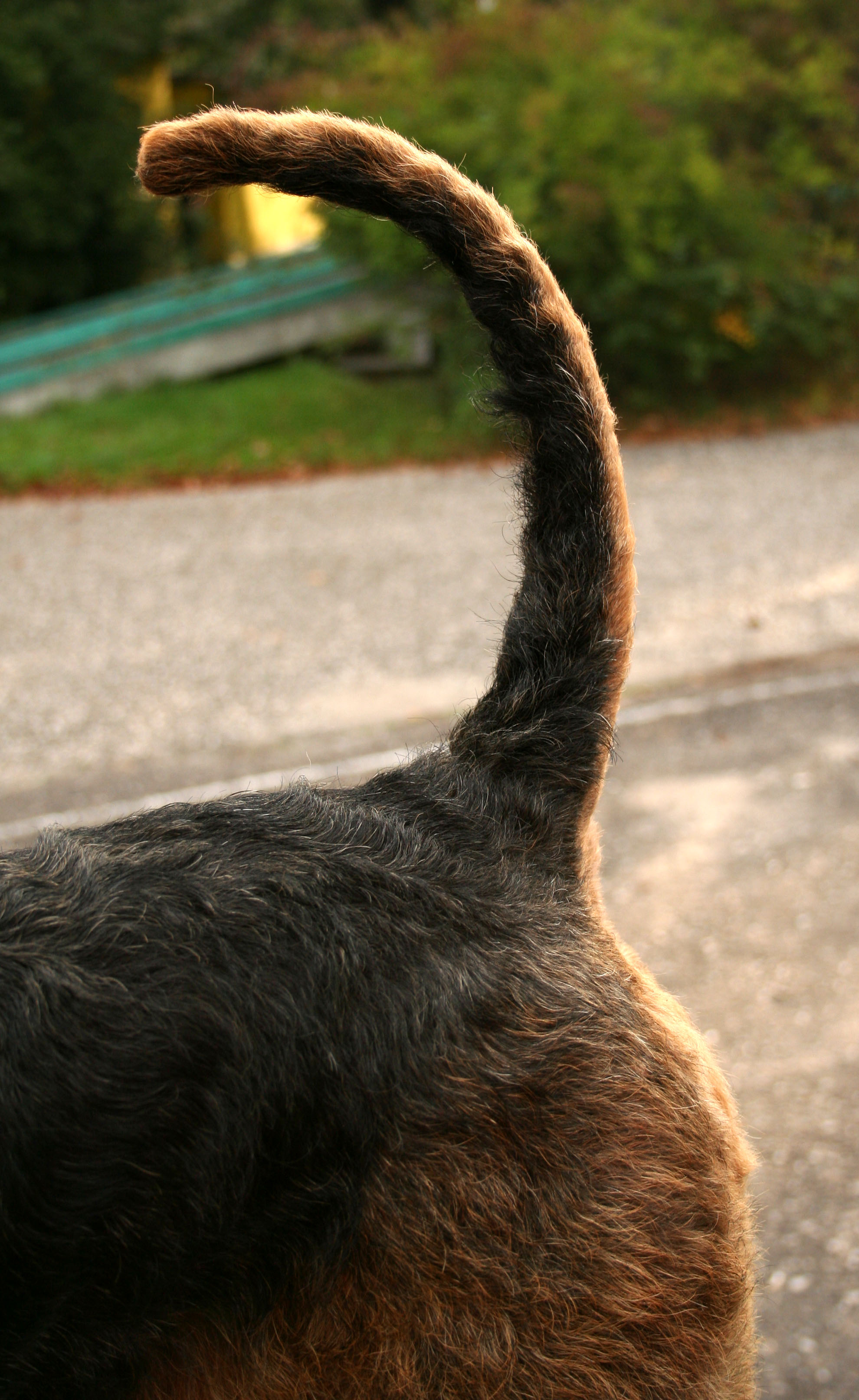 Airedale_terier